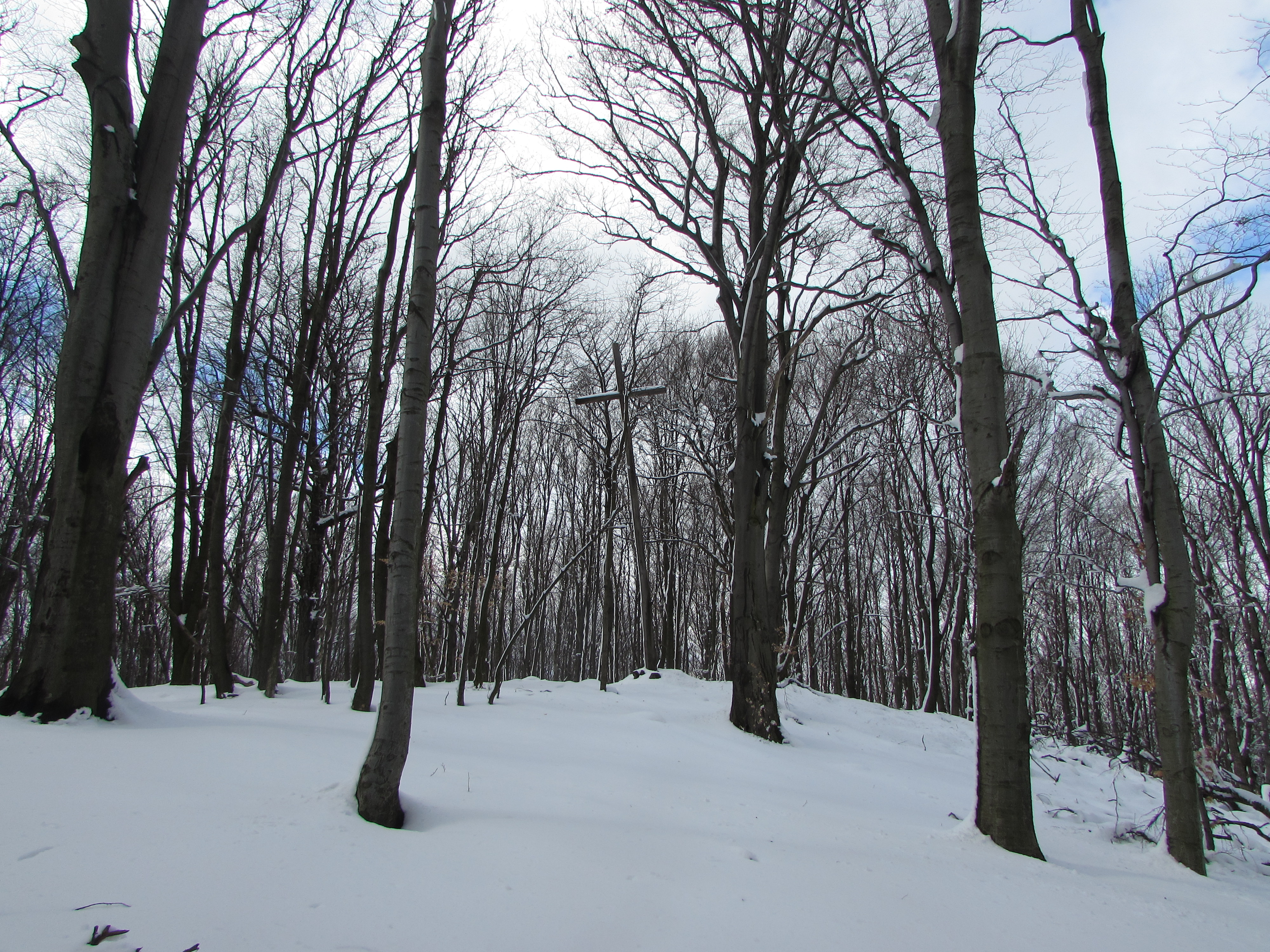 Vrchol Čaračínu 719 m.n.m